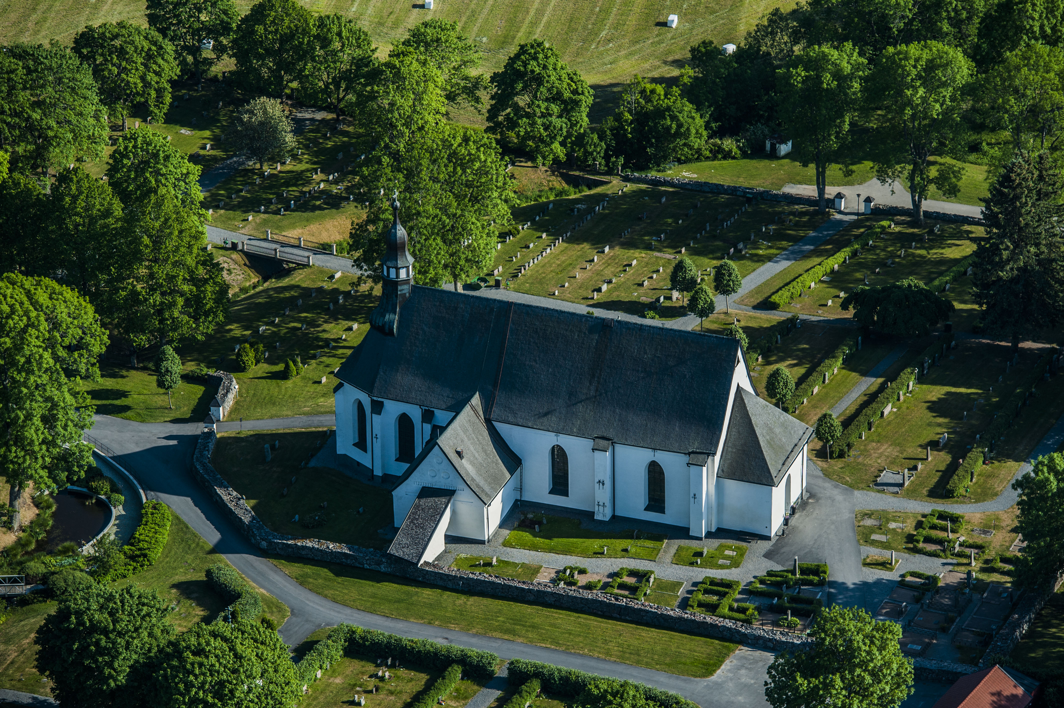 Österåkers ka